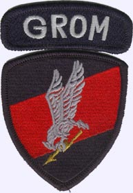 Plakietka GROM